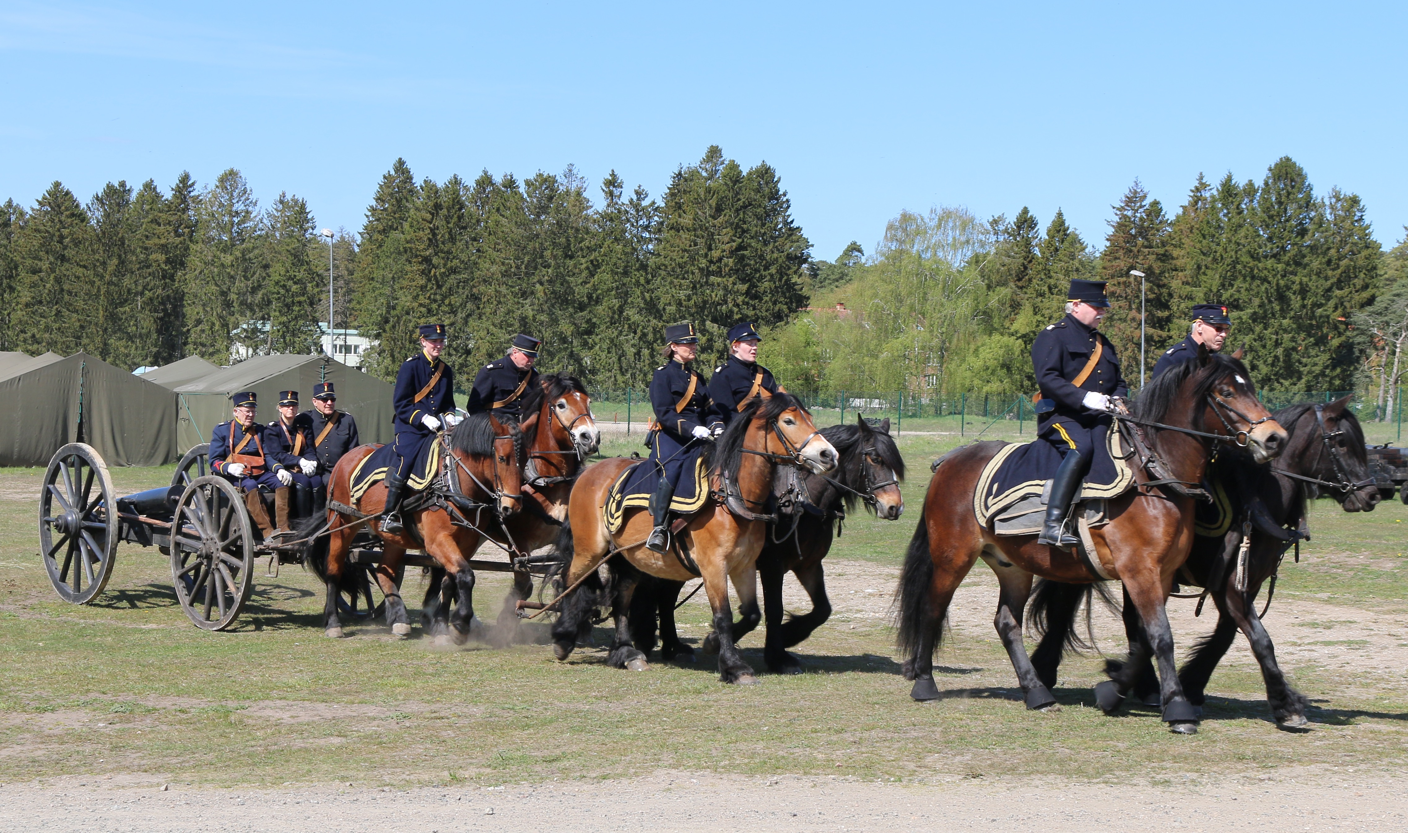 Beridet artilleri Artillerimuseet 2017